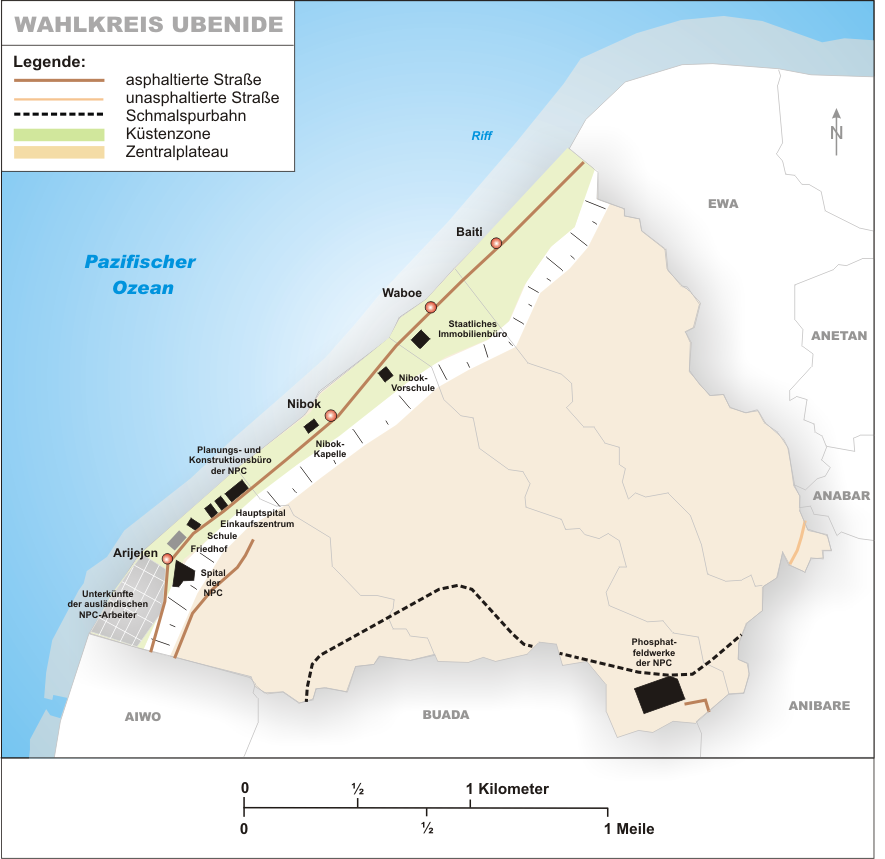 Wahlkreis Ubenide